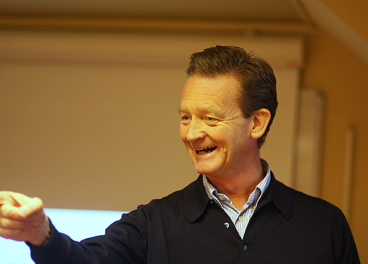 Hans Geelmuyden